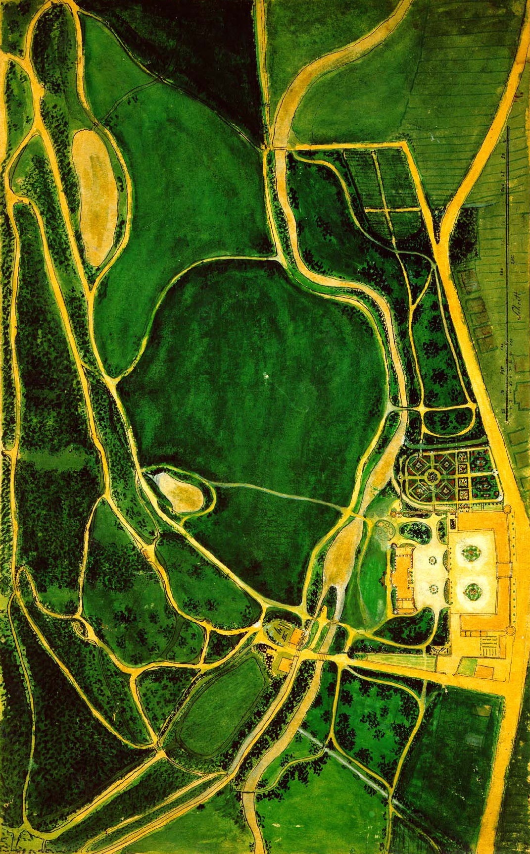 Plan des Schlossareals von Rheder